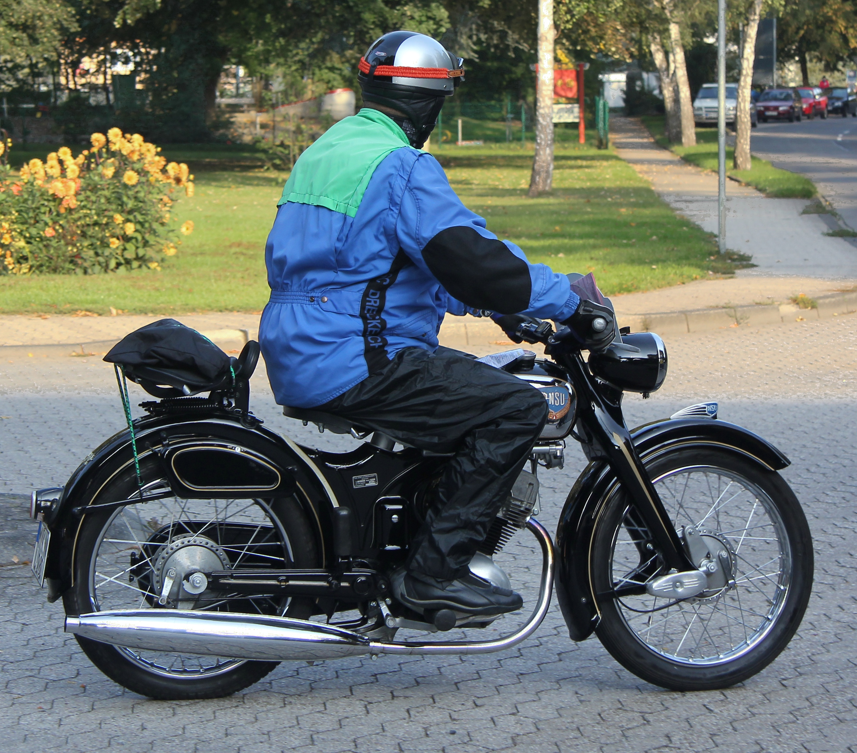 NSU Superfox, Baujahr 1956, bei der Moselschiefer-Classic in Mayen